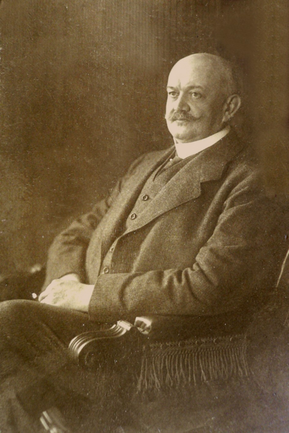 Porträtfotografie von Kurt Fürer